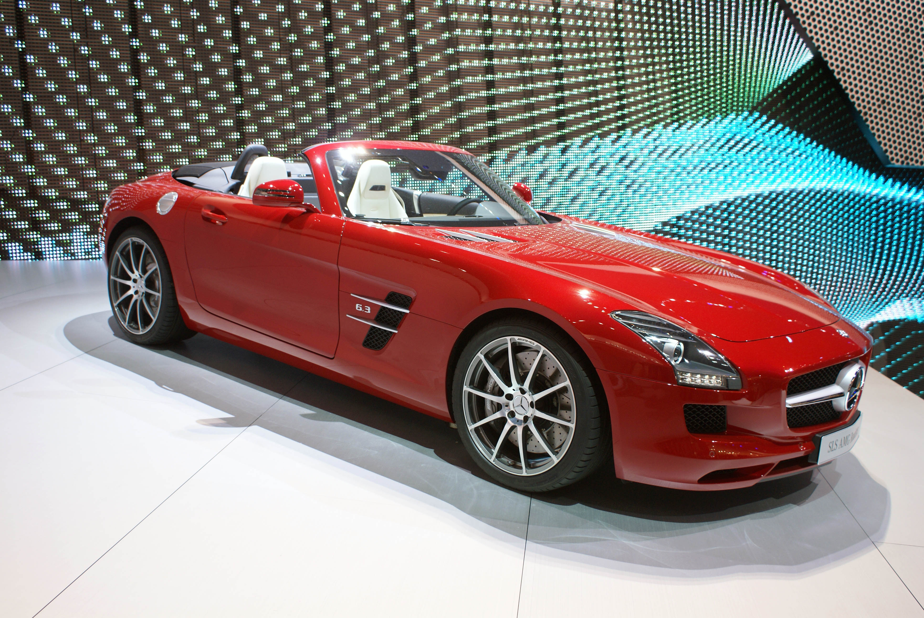 Mercedes-Benz SLS Roadster